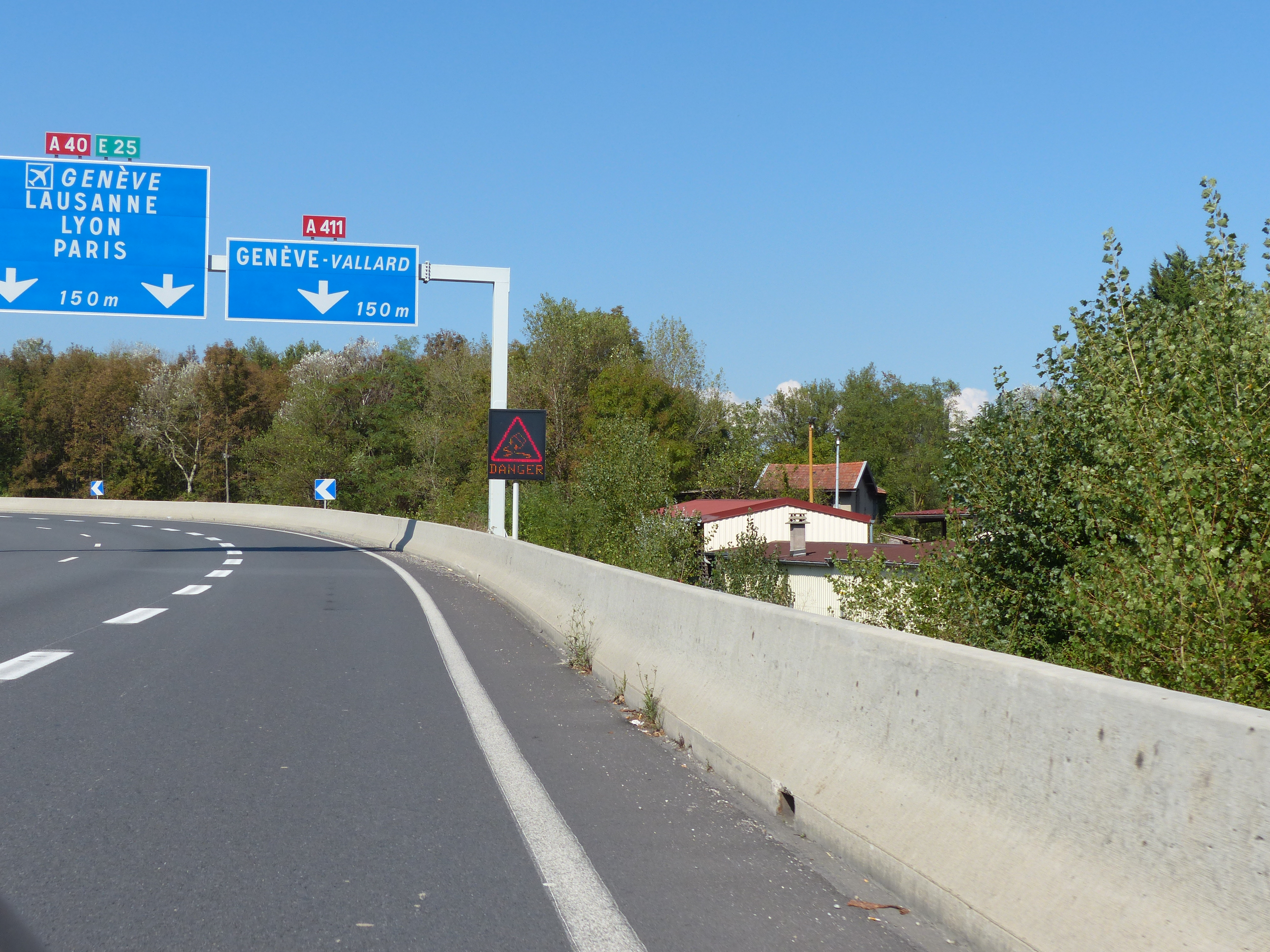 Panneaux XA4 et Da41c, échangeur d'Étrembières, A40, Étrembières, Haute-Savoie, France.